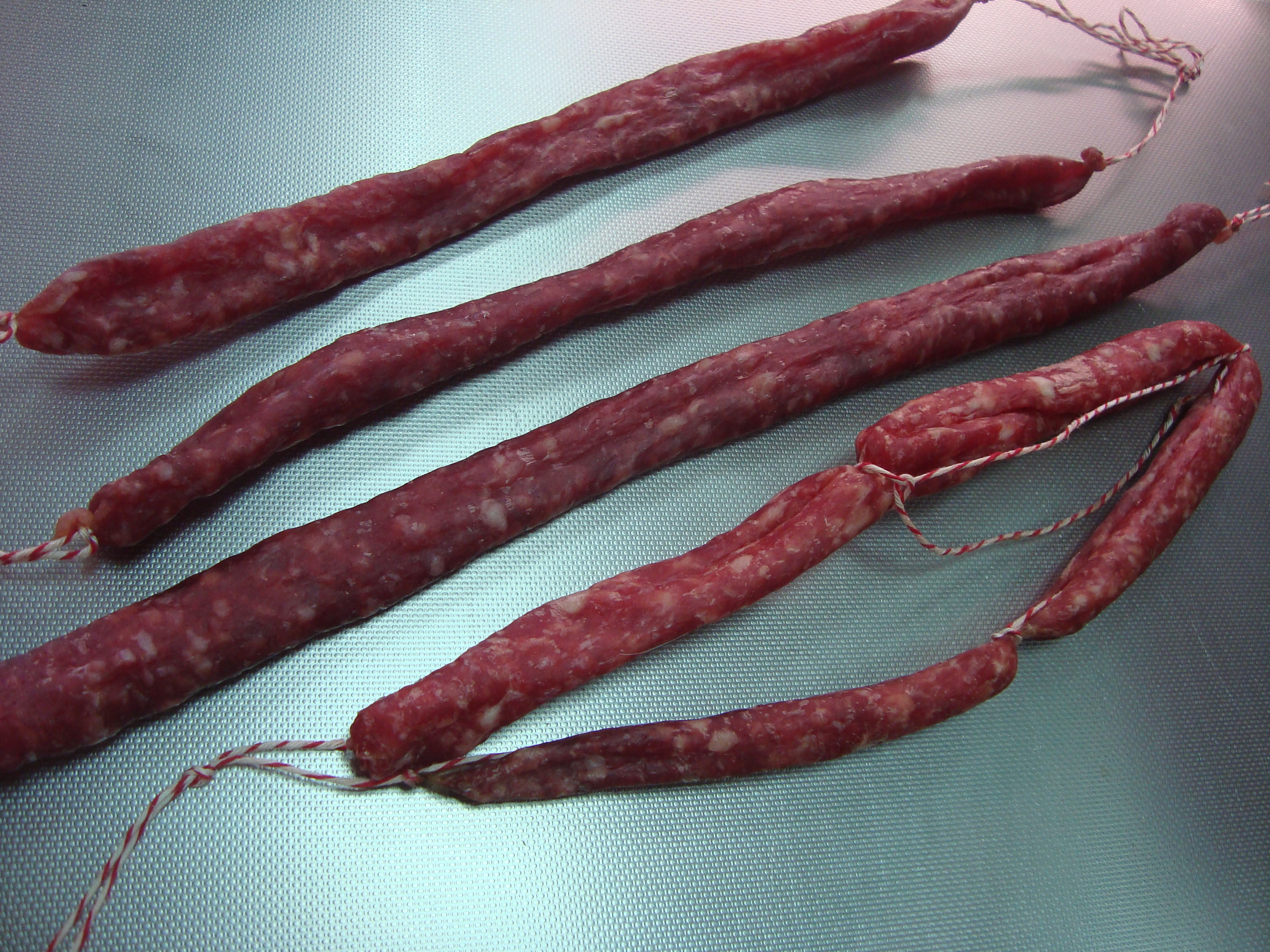 Llonganissa seca de Torreblanca